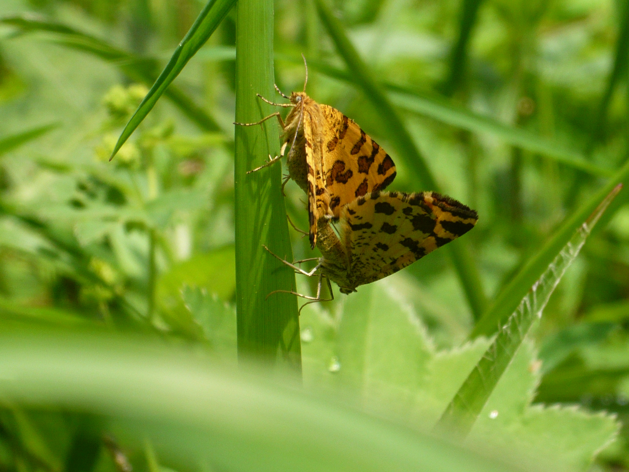 Pseudopanthera macularia couple